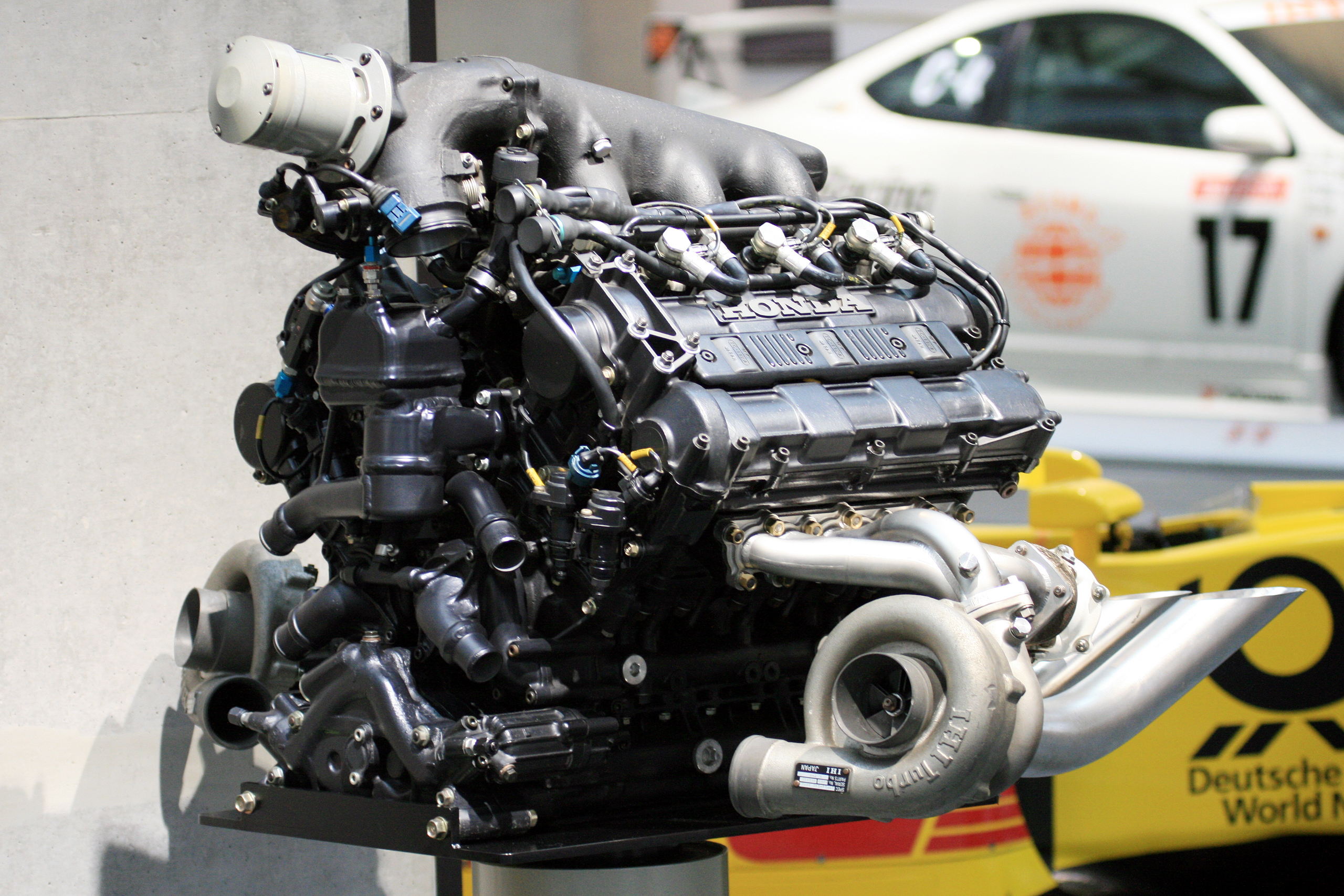 1988 Honda RA168E turbo engine